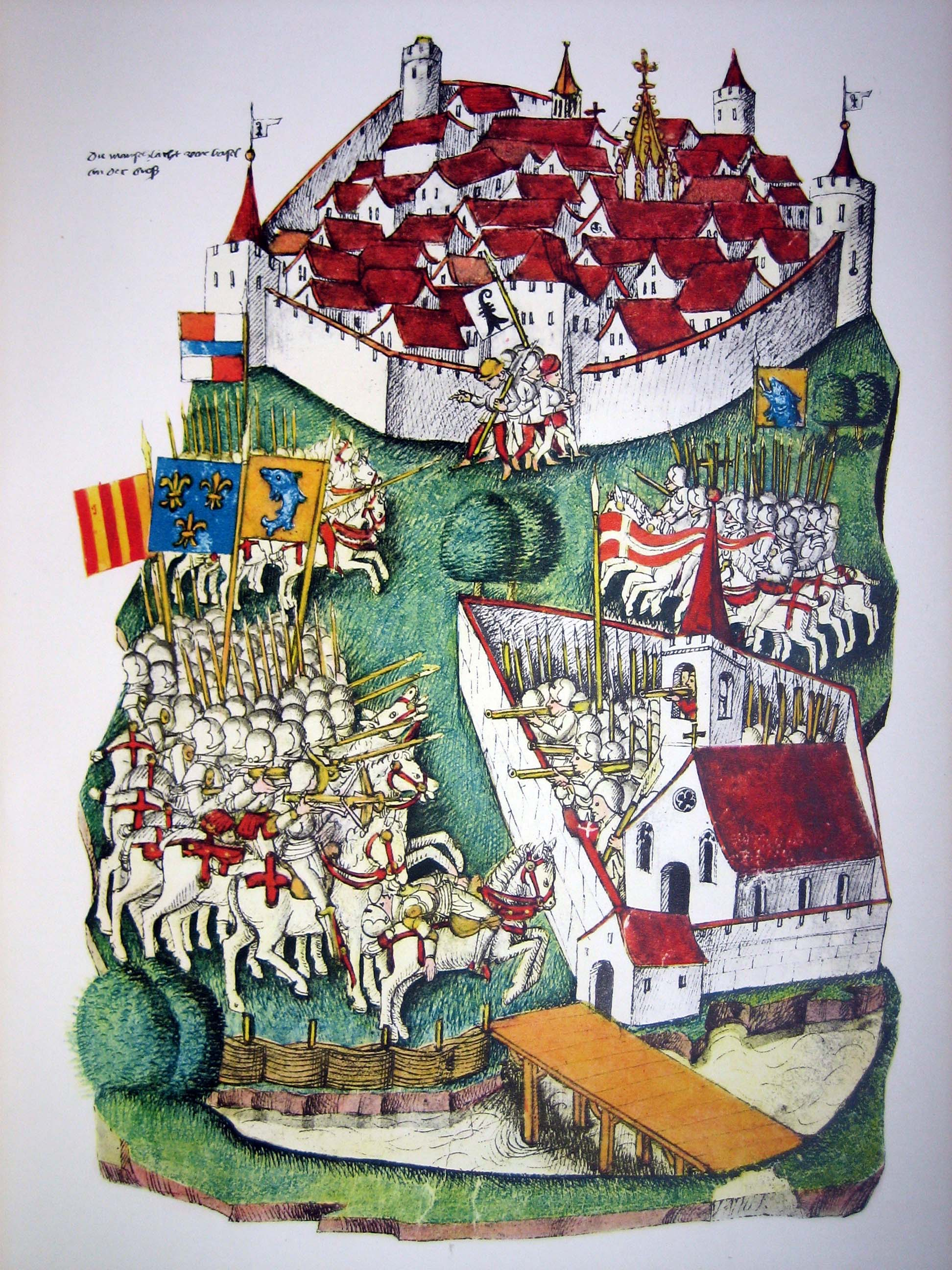 Darstellung der Schlacht bei St. Jakob an der Birs 1444. Kolorierte Federzeichnung